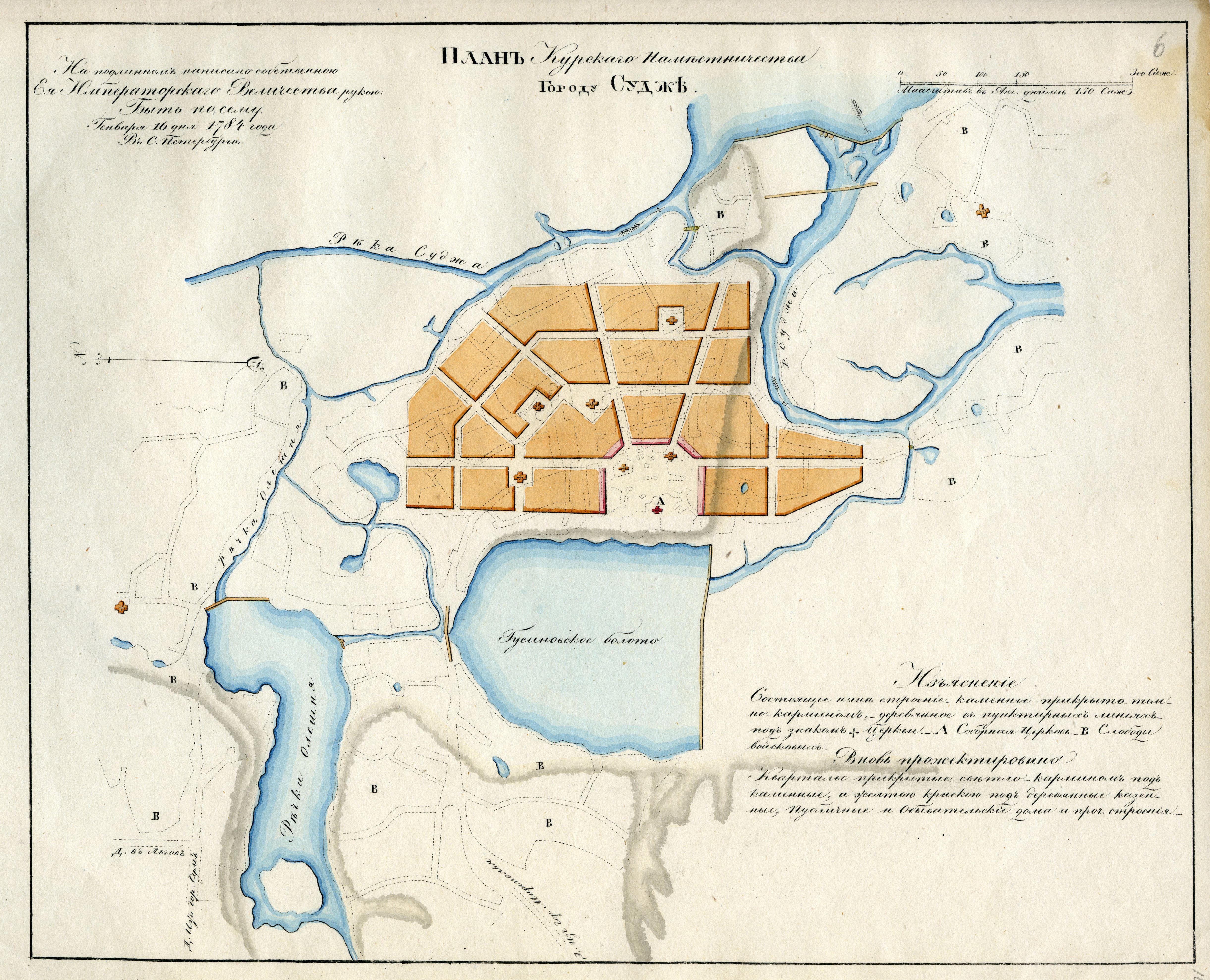 План Курского наместничества городу Судже, 16 января 1784 года